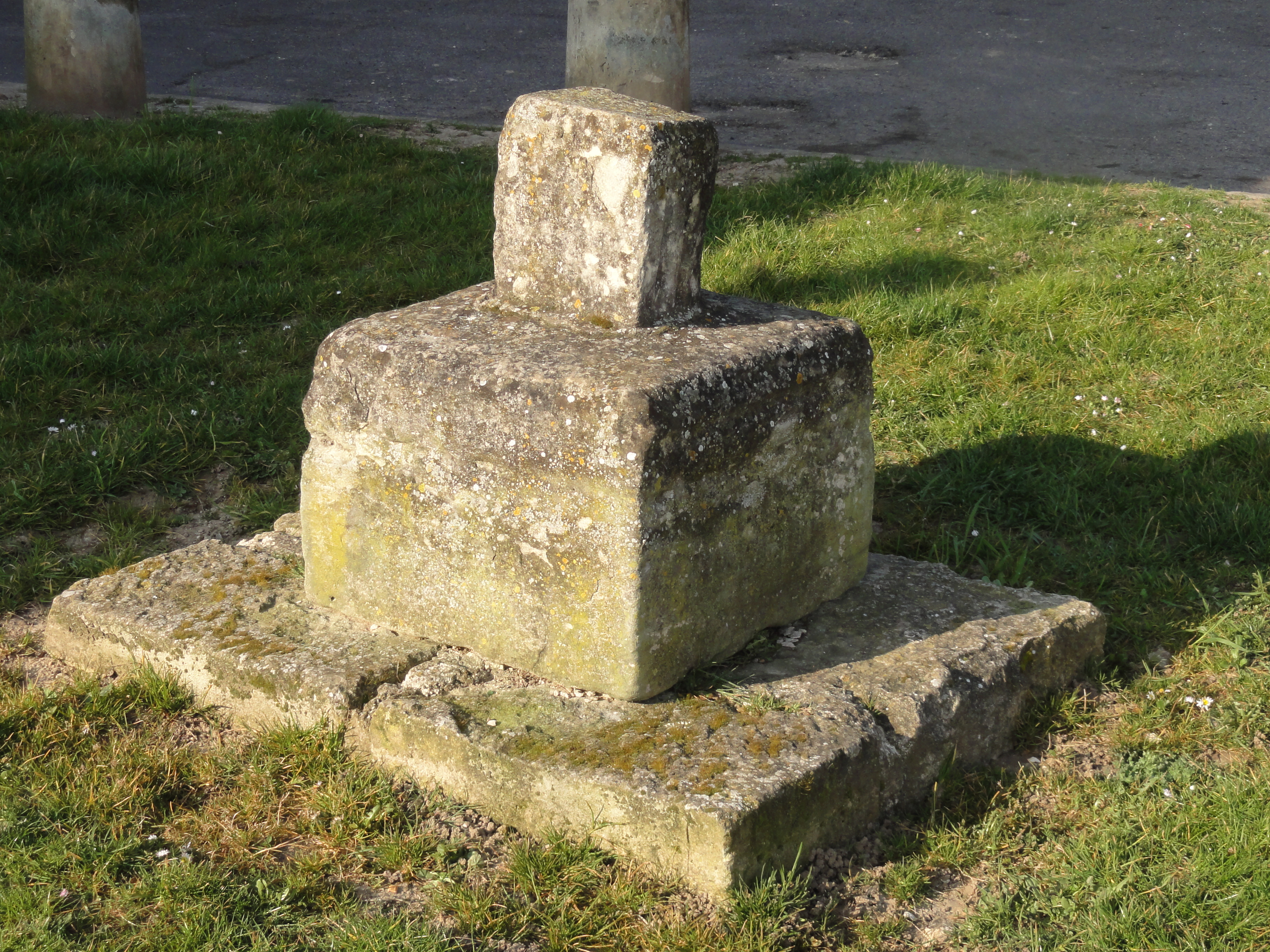 Ancienne croix de cimetière, près de l'église.